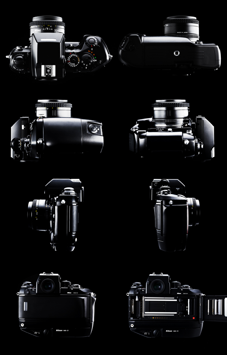 Nikon F4 F4s Camera